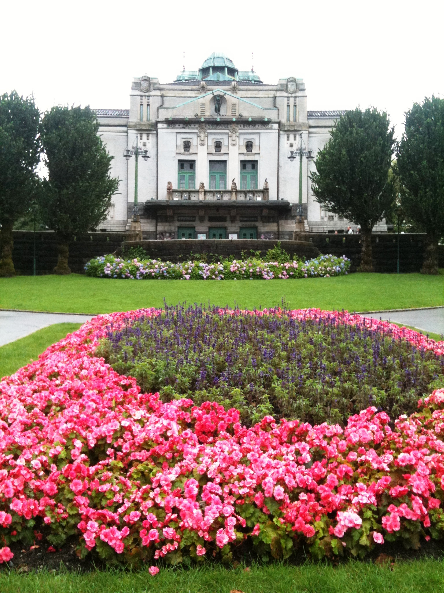 Den nationale scene, og Byparken - Bergen